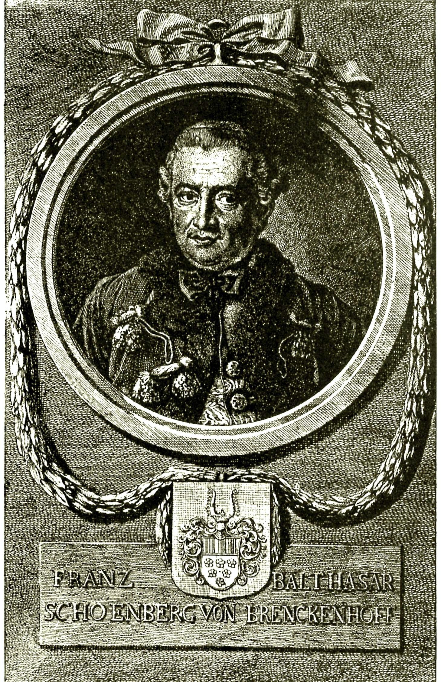 Portrait des Franz Balthasar Schoenberg von Brenkenhoff